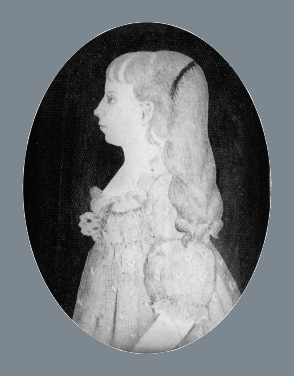 Painting, miniature; Paintings